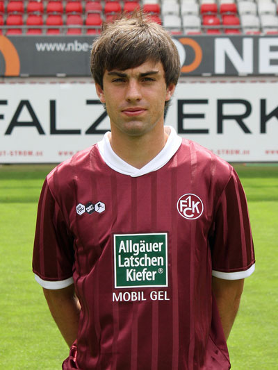 Jan Moravek, Fußballspieler